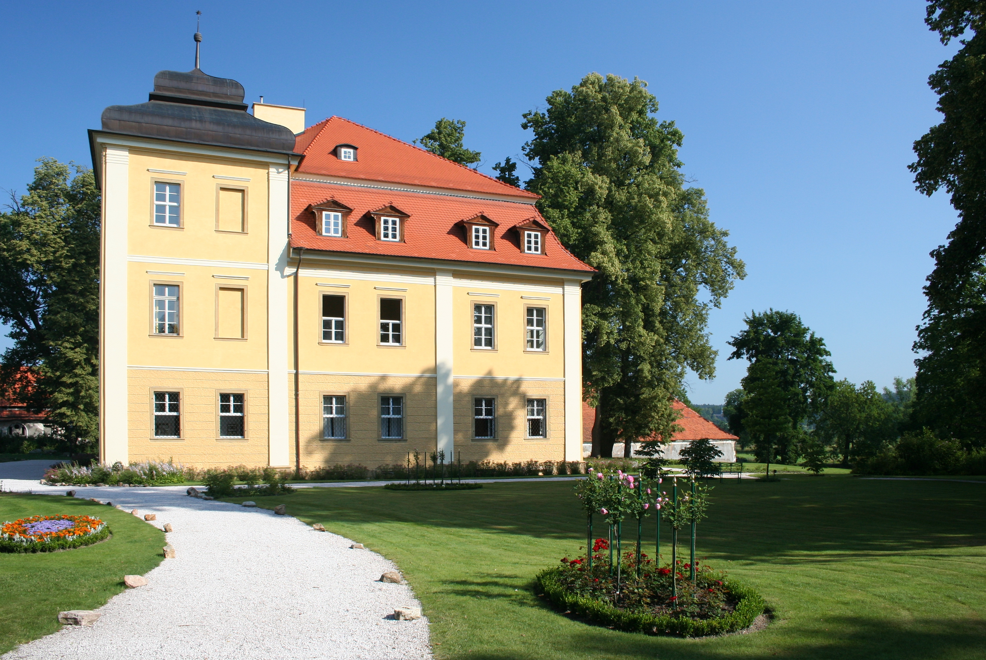 Hotel Pałac Łomnica w Łomnicy, koło Jeleniej Góry. Hotel Schloss Lomnitz. Hotel Castle Lomnica, near Jelenia Gora, Poland.